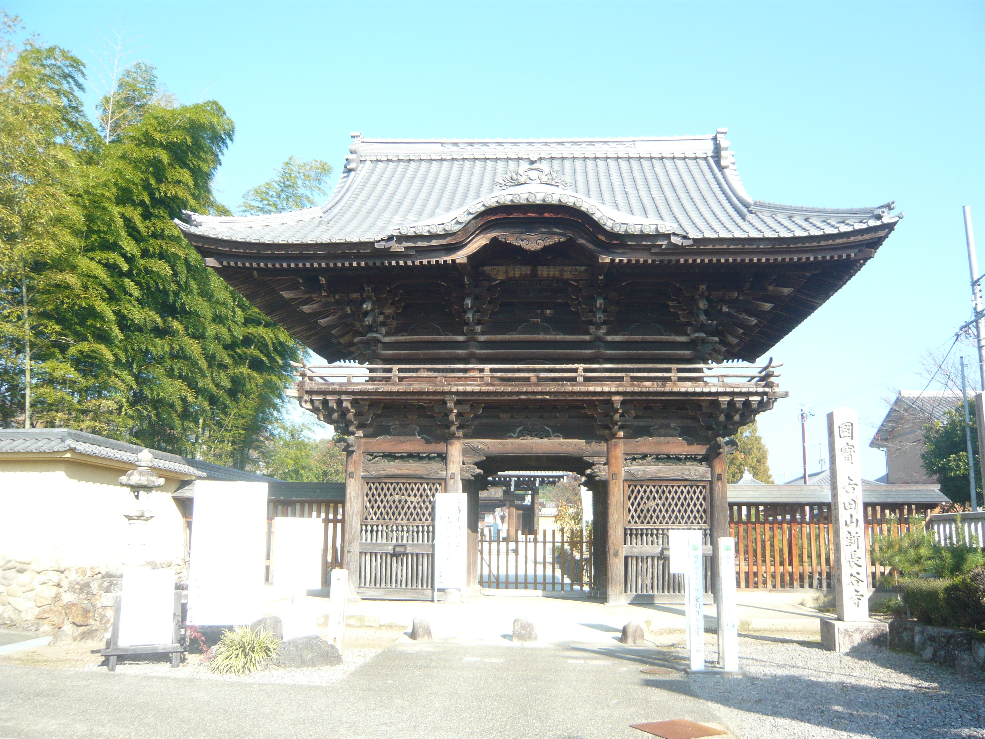 Shin-Chokokuji 新長谷寺の仁王門（新長谷寺）,Seki,Gifu,Japan（岐阜県関市）で撮影。